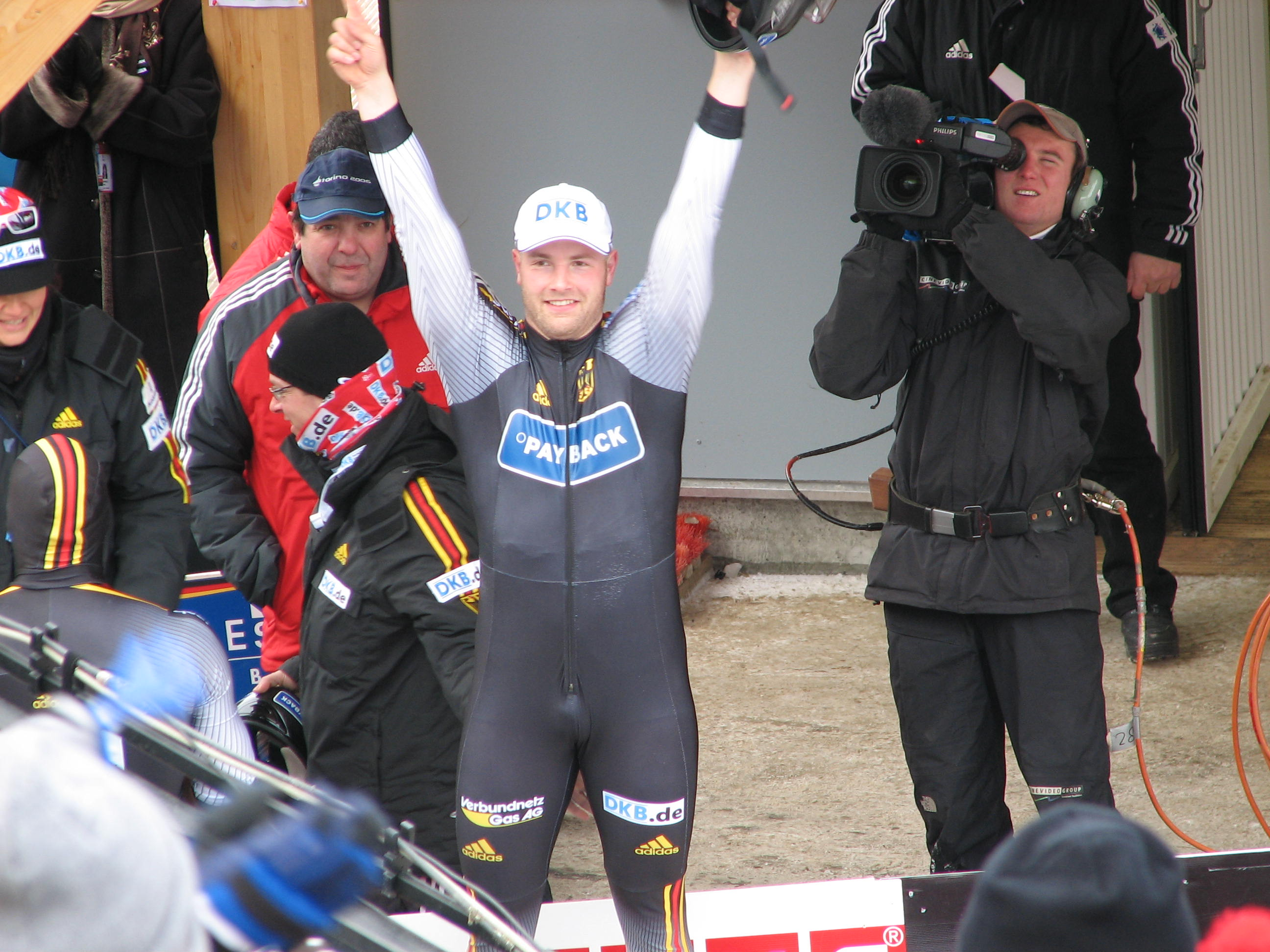 Bob-Weltmeisterschaft in Altenberg 2008, 11. - 24. Februar 2008